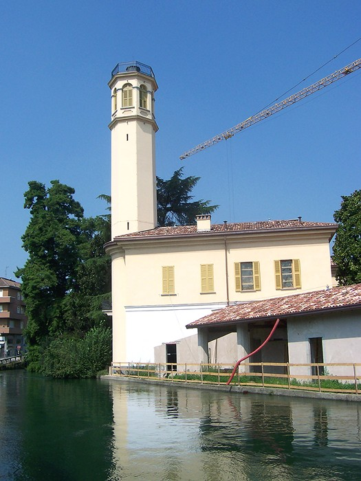 Inzago - Naviglio Martesana e Torre Aitelli